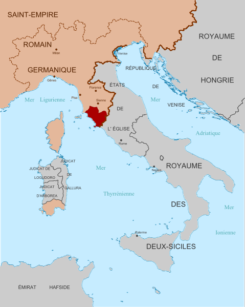 Domaines de la famille Aldobrandeschi en 1274, avant la scission entre le comté de Soana et le comté de Santa Fiora